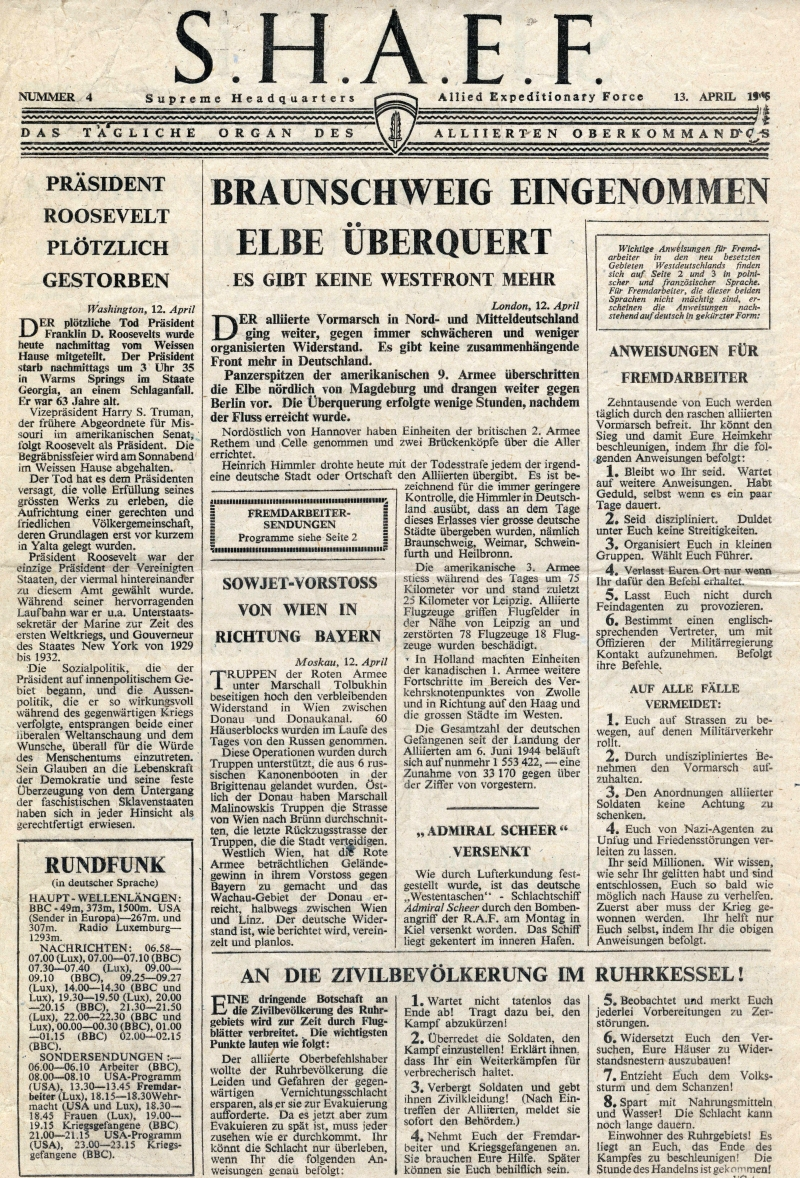 SHAEF-Flugblatt „Das tägliche Organ des Alliierten Oberkommandos“, Nummer 4, vom 13. April 1945.